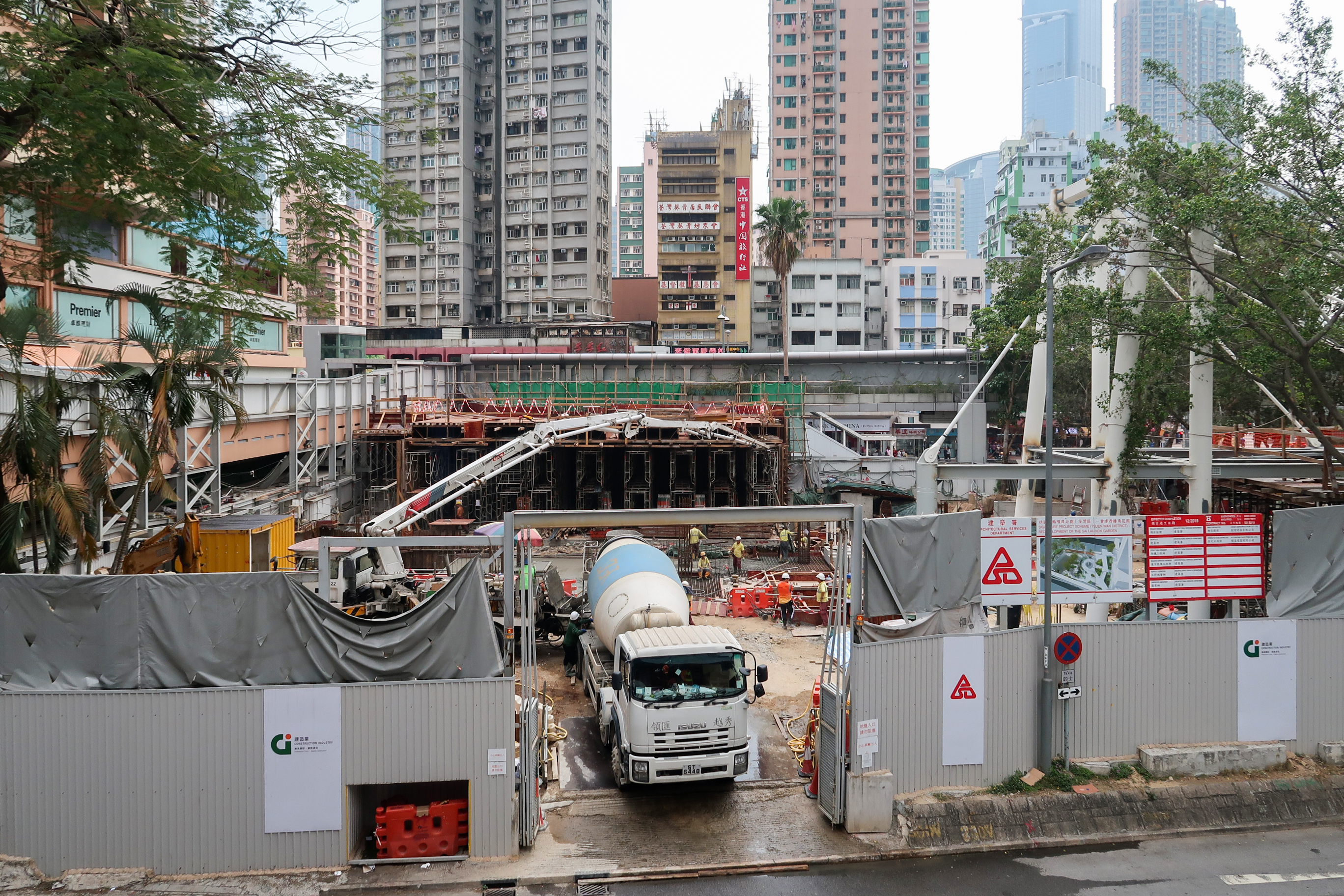 Sai Lau Kok Garden Reconstruction site